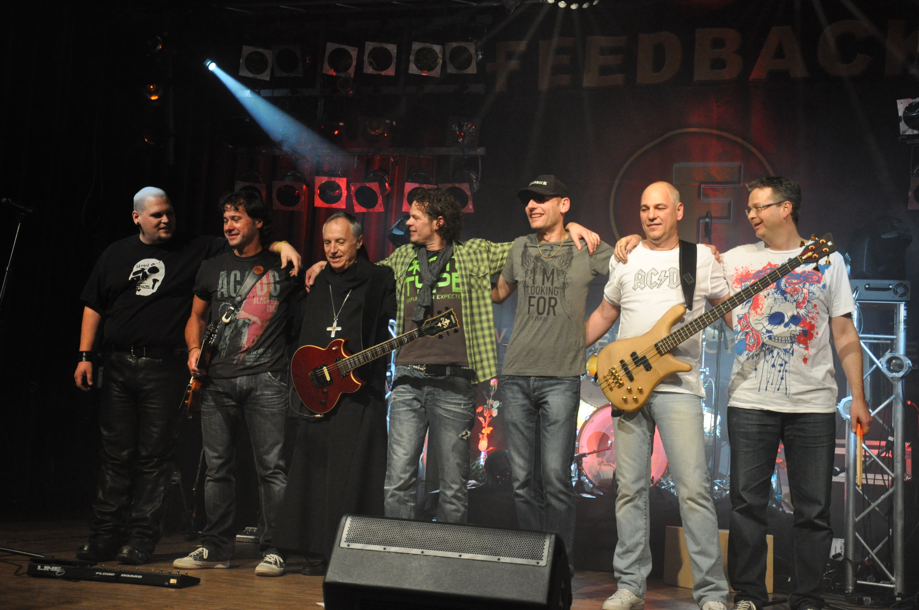 Mit neuem Sänger Roland Gläser. Debüt am 18.11.2011 in Planegg